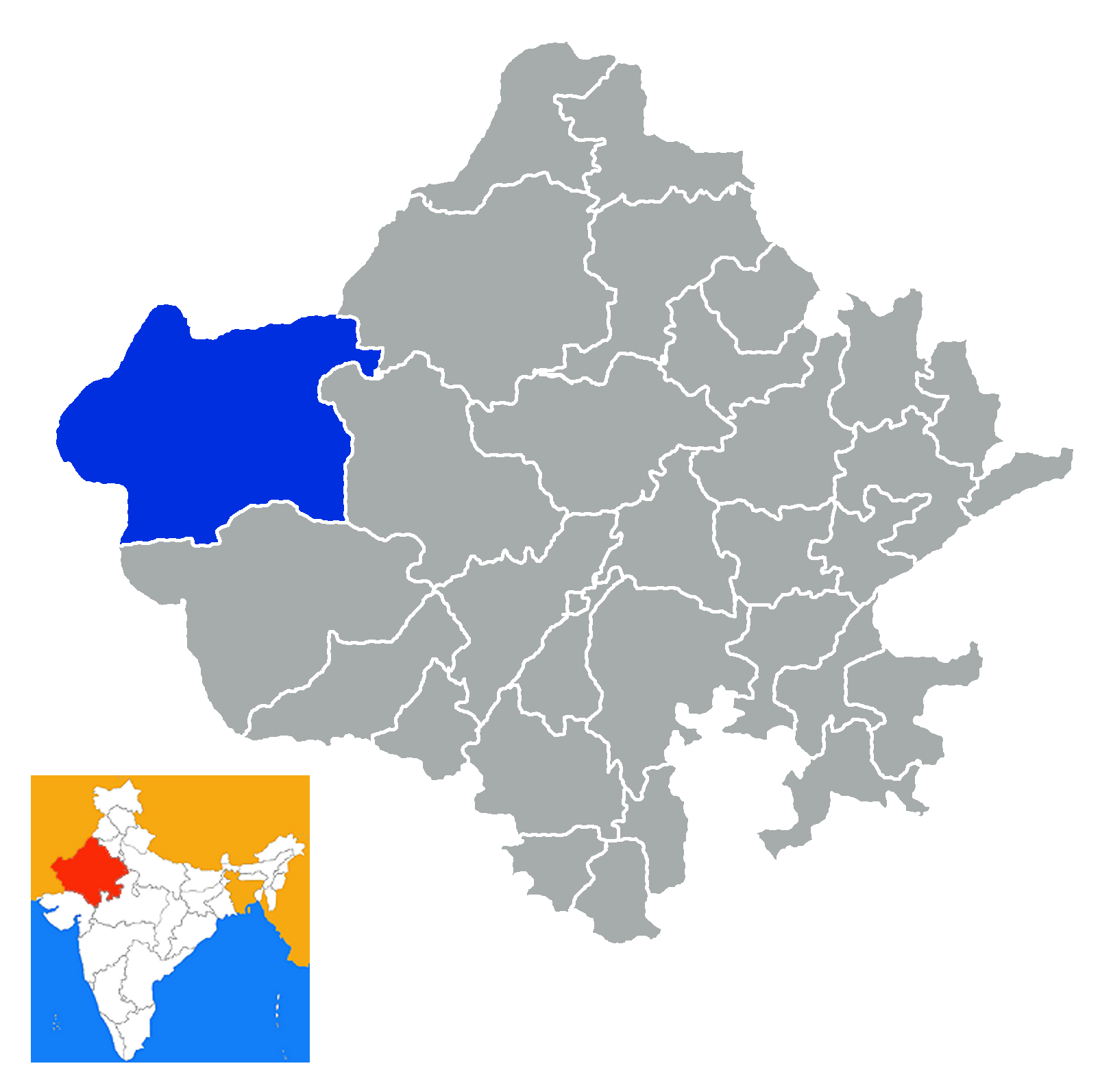 Distrito de Jaisalmer Rajastan India